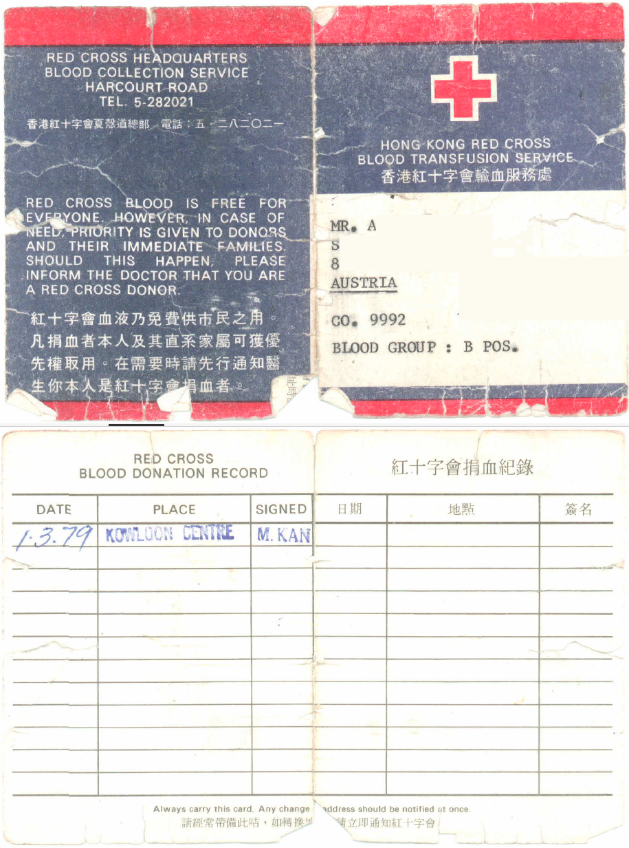 Blutspenderausweis aus Hongkong, Vorder- und Rückseite, 1. März 1979.png